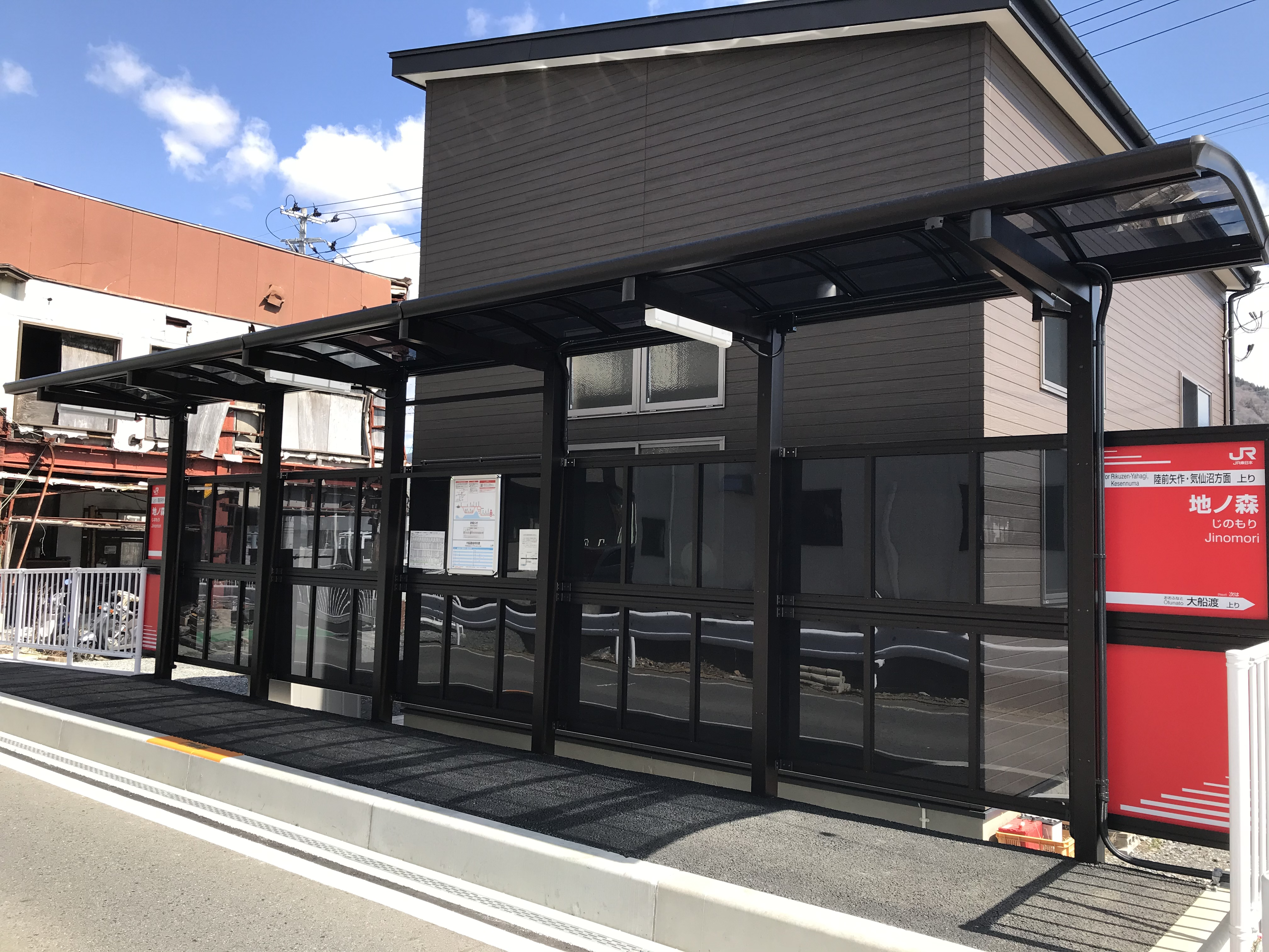 JR東日本BRT大船渡線の地の森駅